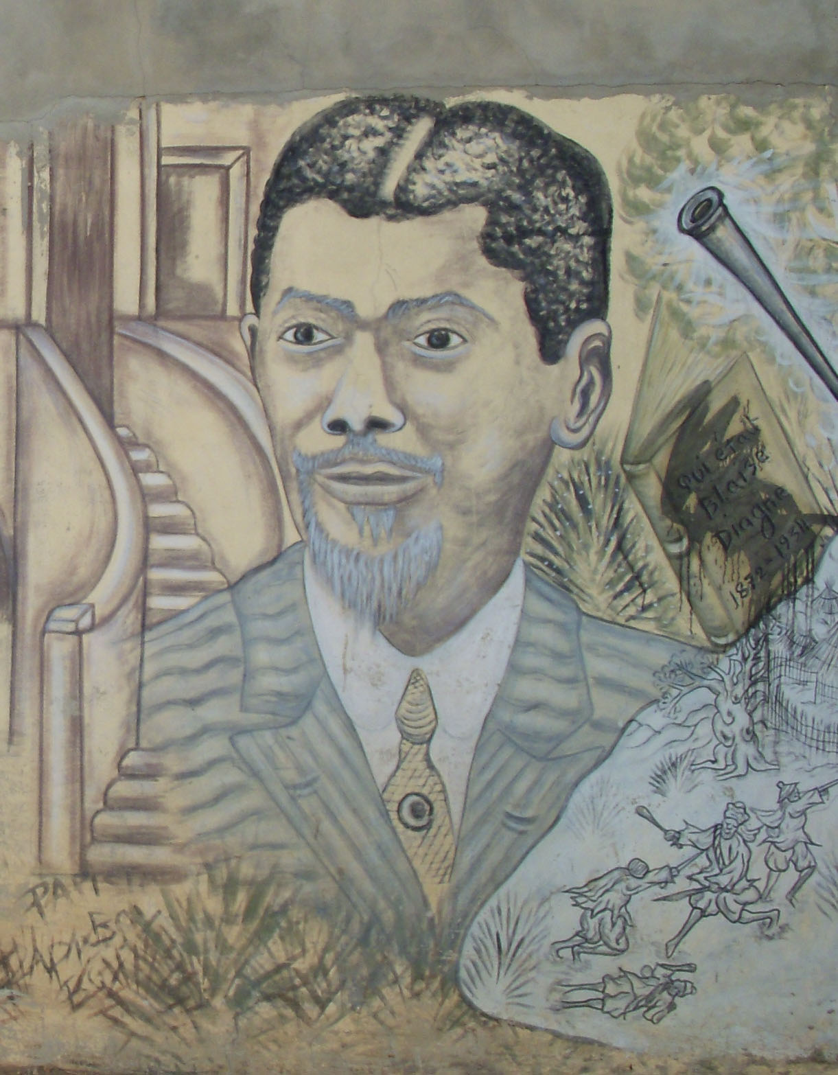 Blaise Diagne (1872-1934), premier député africain à l'Assemblée nationale française (fresque à Dakar, Sénégal)